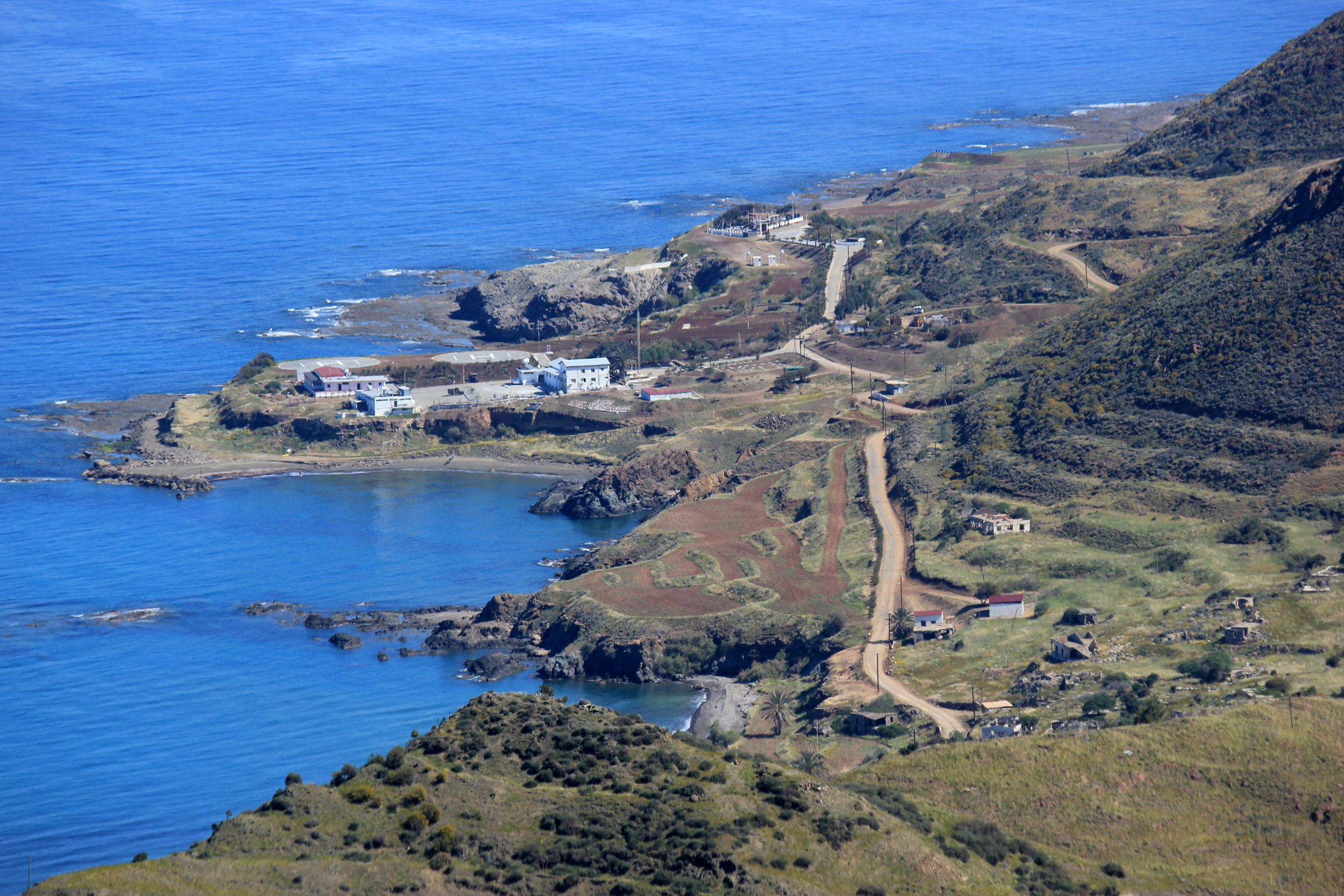 Erenköy, Blick auf den verlassenen Ort und türkische Militäreinrichtungen.